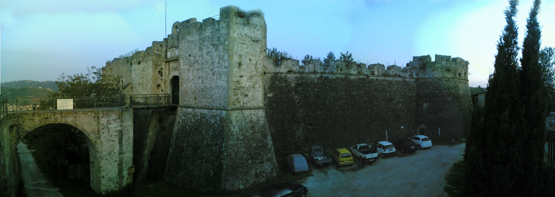 Carlo Iannuzzi, Opera Propria, Il Castello di Agropoli, GFDL e Creative Commons CC-BY-SA tutte le versioni (3.0, 2.5, 2.0 e 1.0), sono l'autore